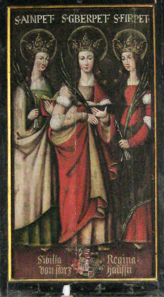 Darstellung der Drei Bethen auf der Mitteltafel des Triptychons in St. Alto in Leutstetten.